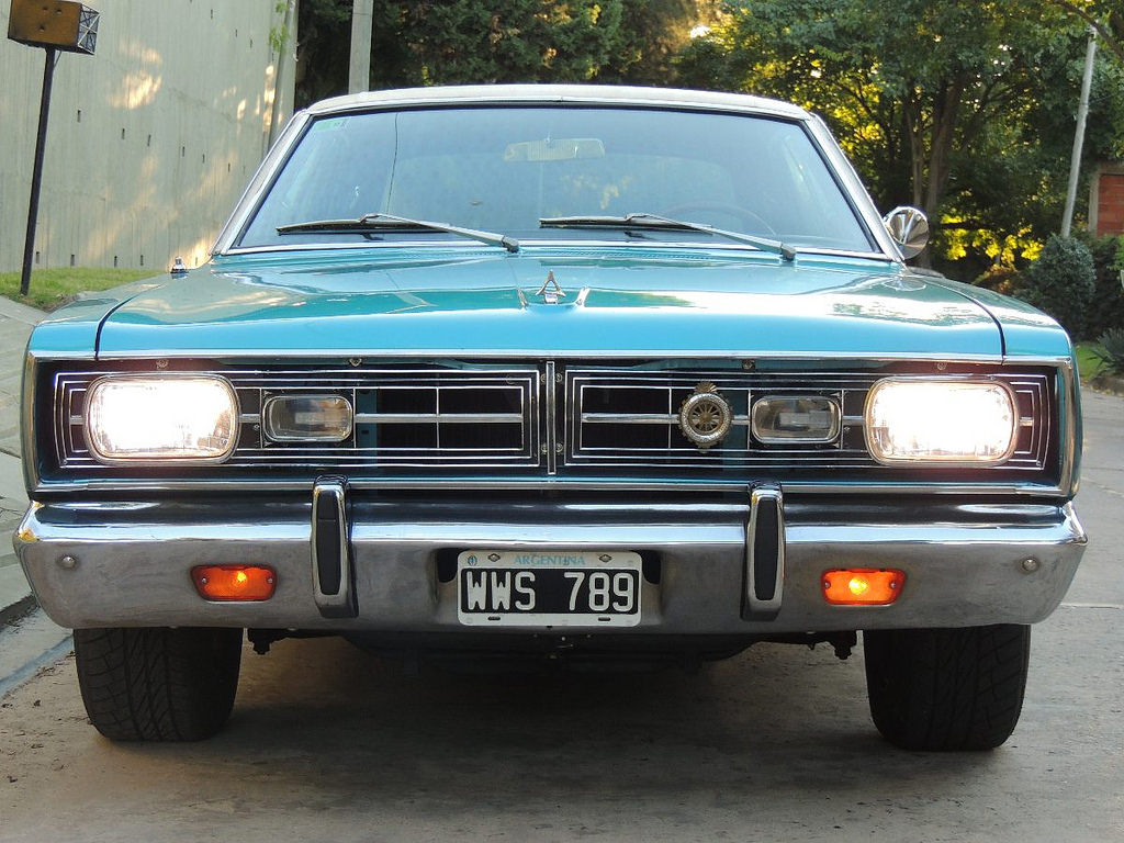 gtx